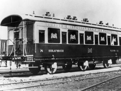 CIWL-Schlafwagen 74, Aufnahme um 1880